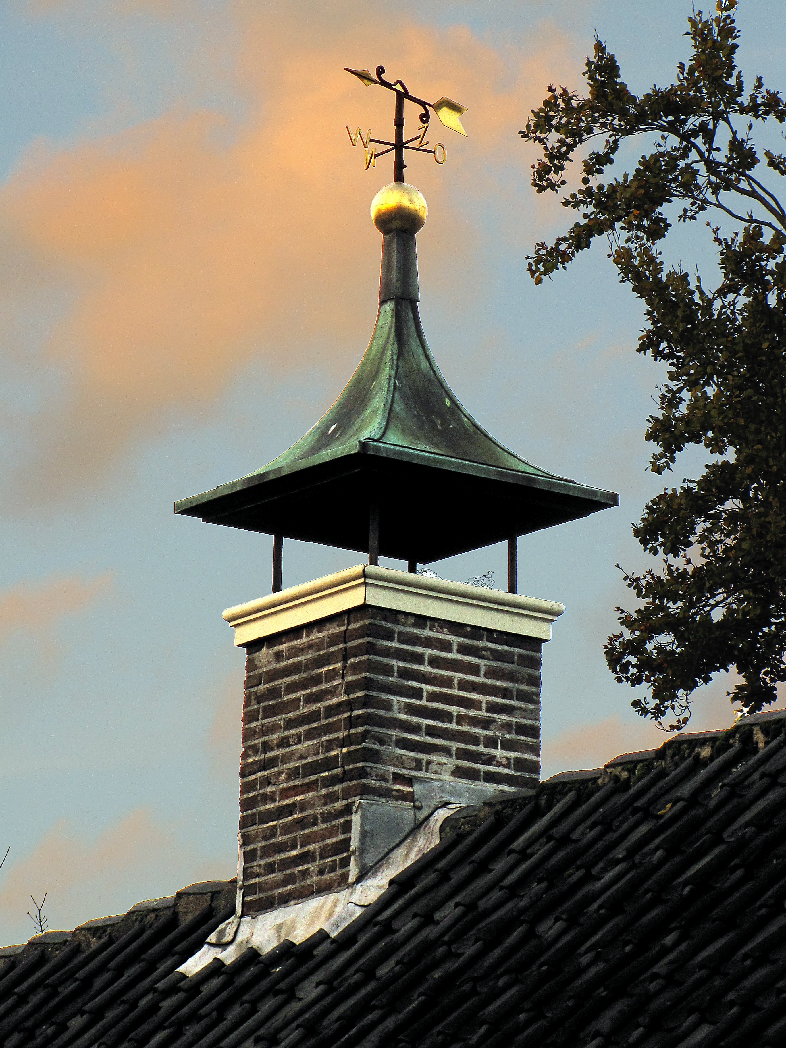 De noordelijke schoorsteen op de voormalige bakkerij met boven de kap een pijl als windwijzer.